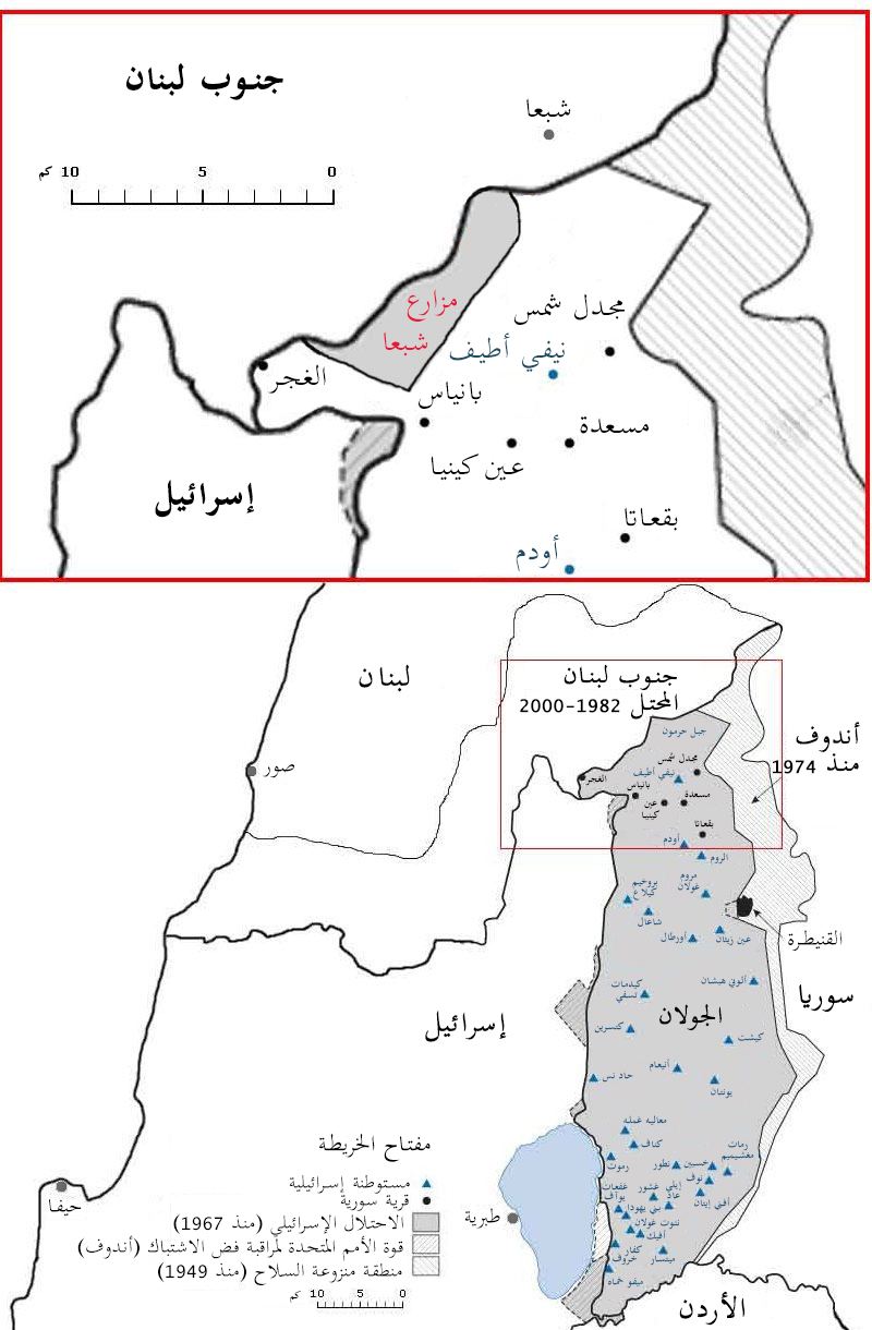 موقع مزارع شبعا